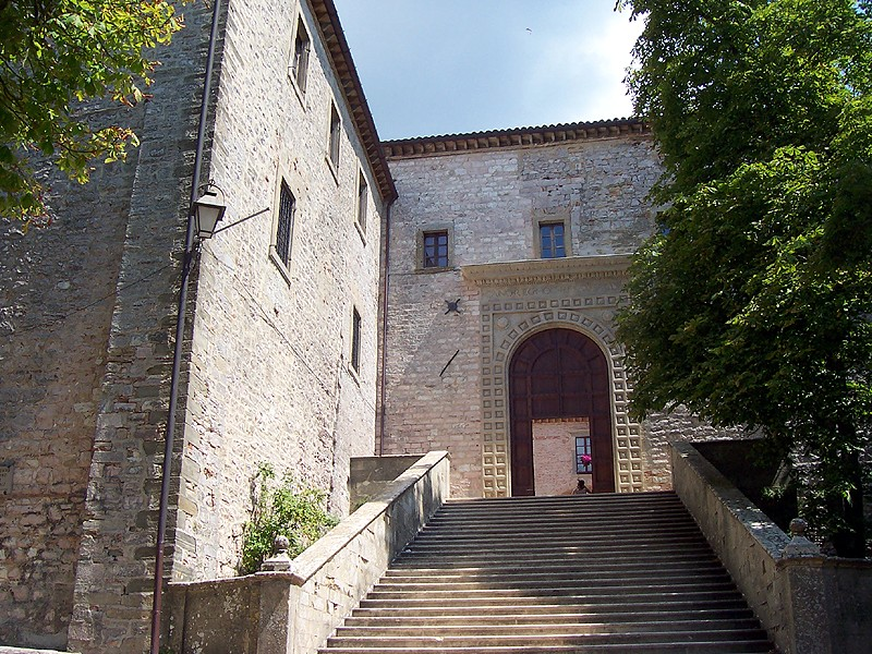 Gubbio - Basilica di S. Ubaldo